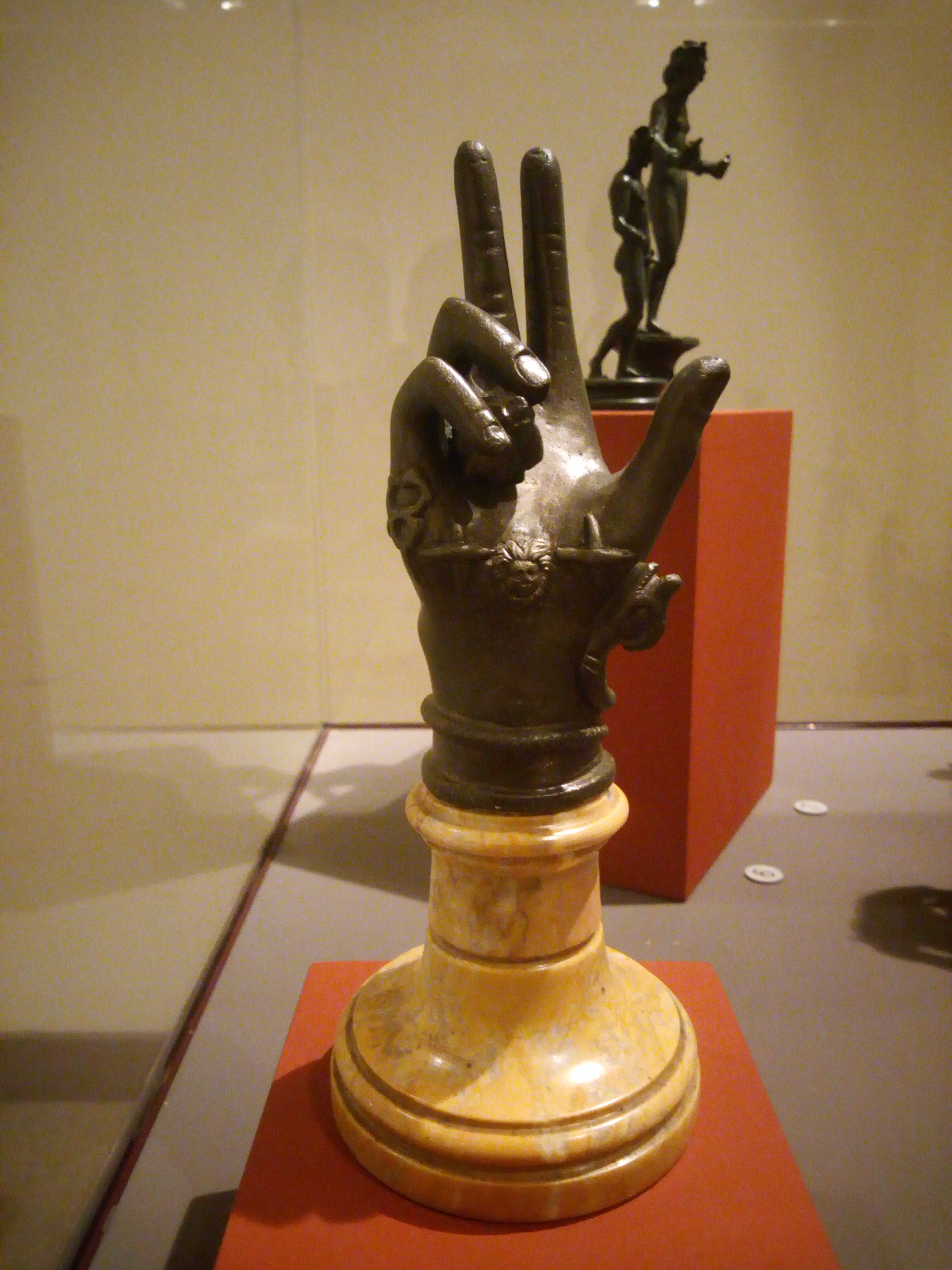 Main de Sabazios au musée du Cinquantenaire, à Bruxelles, Belgique